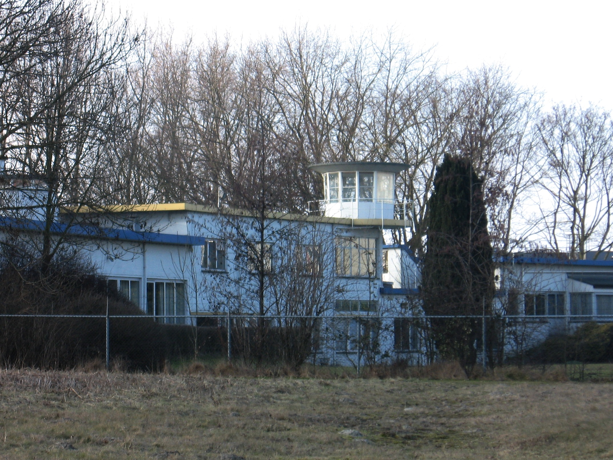 stationsgebouw met verkeerstoren Ypenburg (veldzijde)